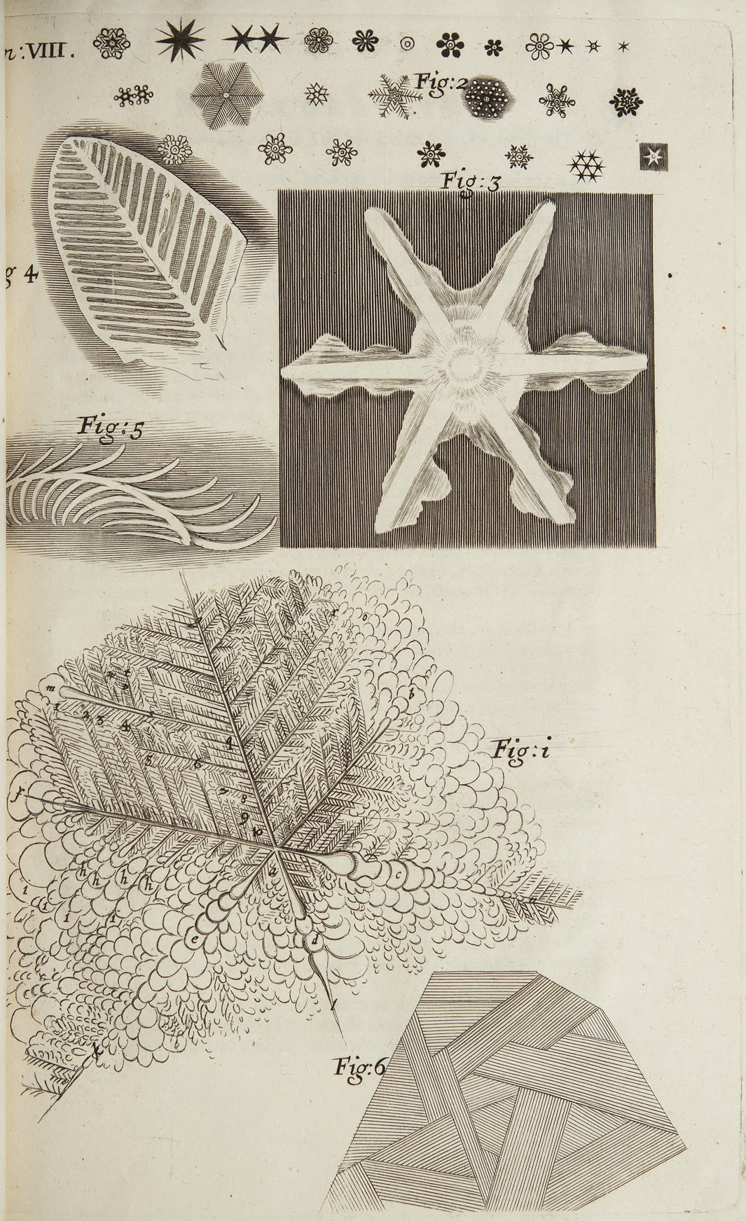 Schem. VIII - Of several kindes of frozen Figures.